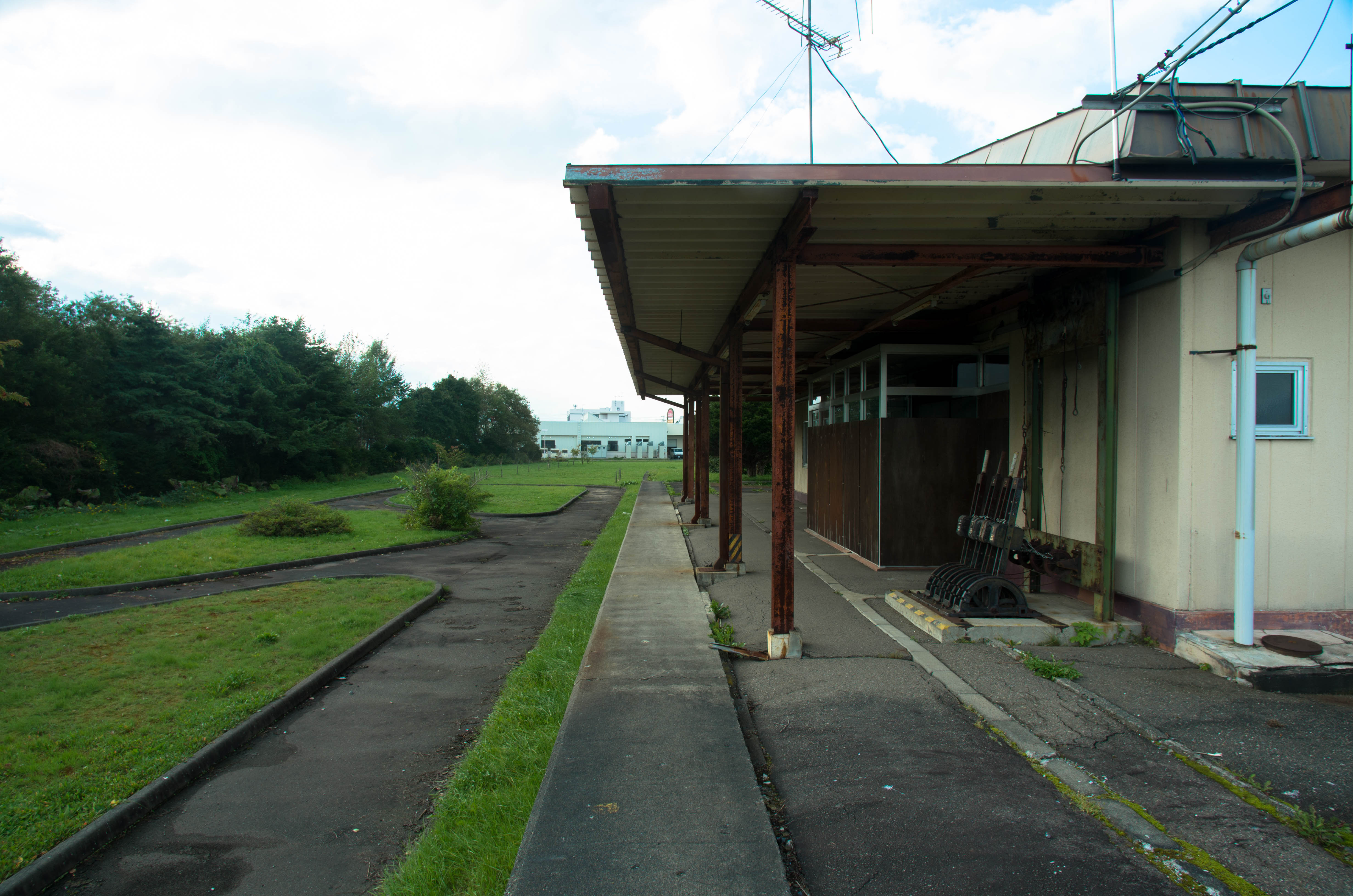 日本国有鉄道広尾線大樹駅ホーム、線路跡